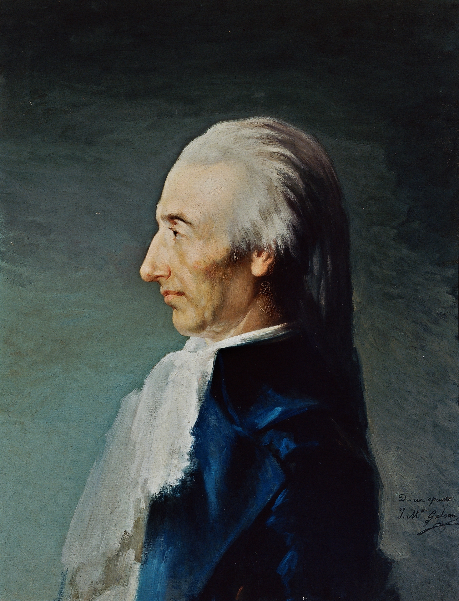 Retrato del marino y científico español Alejandro Malaspina (1754-1809), que llegó a ser brigadier de la Real Armada Española.